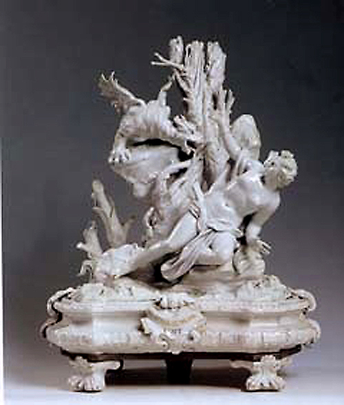 Andromeda e l'orca. Gruppo in porcellana. Ginori a Doccia 1750 c.